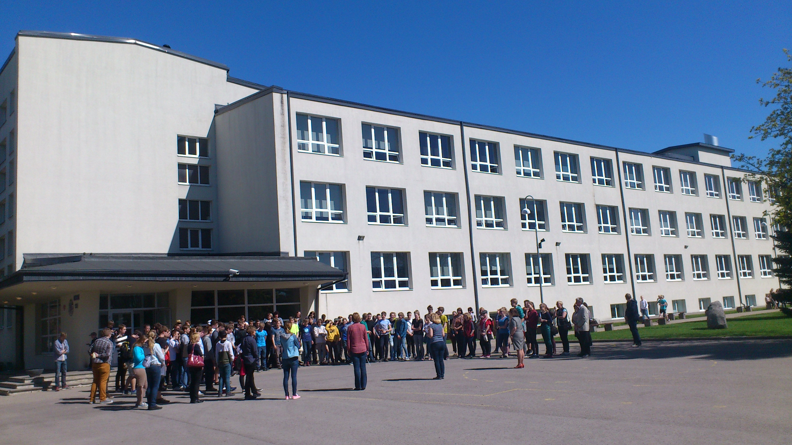 Geograafiaolümpiaadi lõppvoor Paides 6.-7. mail 2016